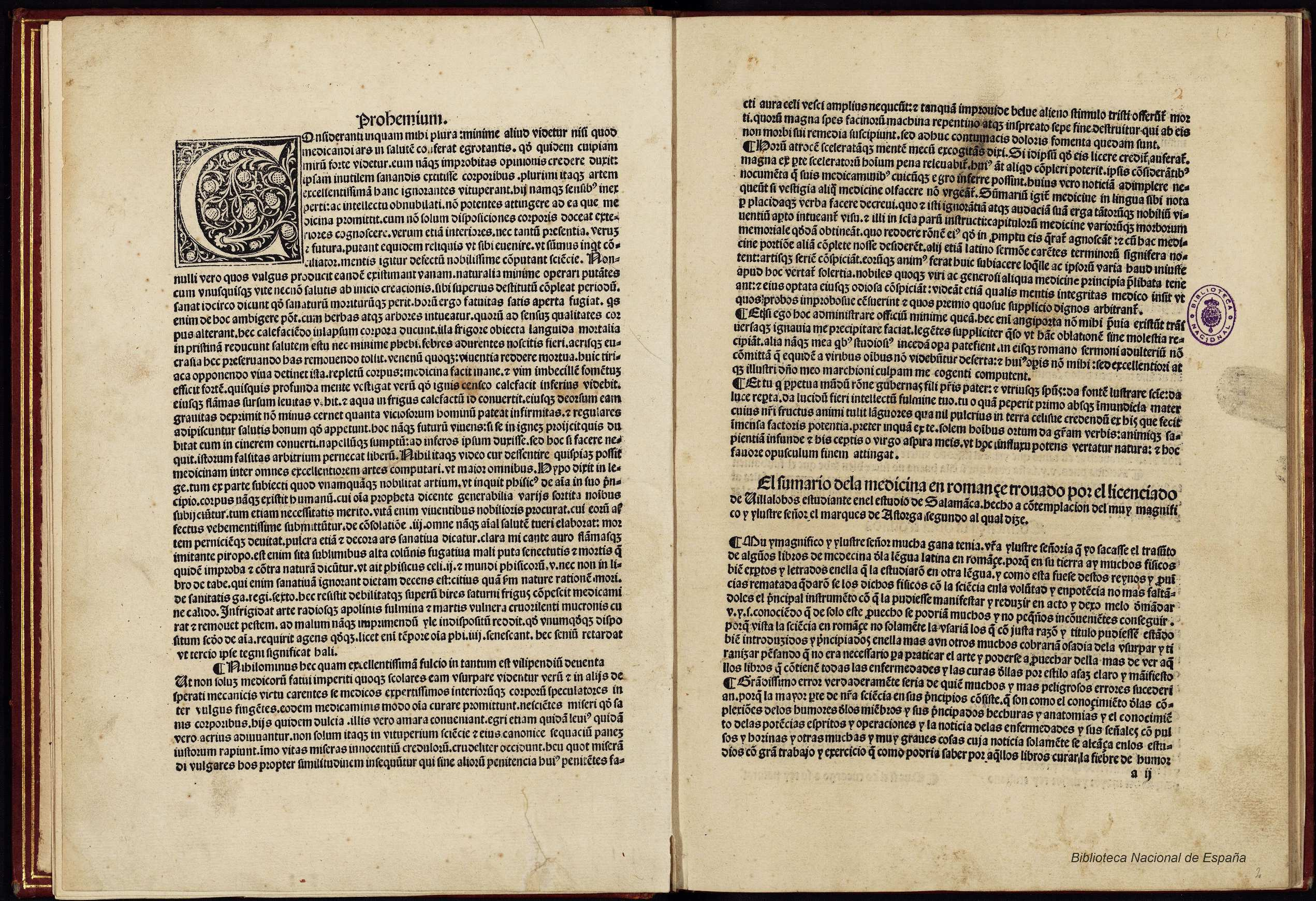 Sumario de la medicina ; Tratado sobre las pestiferas bubas Autor: López de Villalobos, Francisco (1473-1549) edición: Imprimido en la cibdad de Salamanca [por Juan de Porras] a sus expe[n]sas de Antonio de Barreda librero